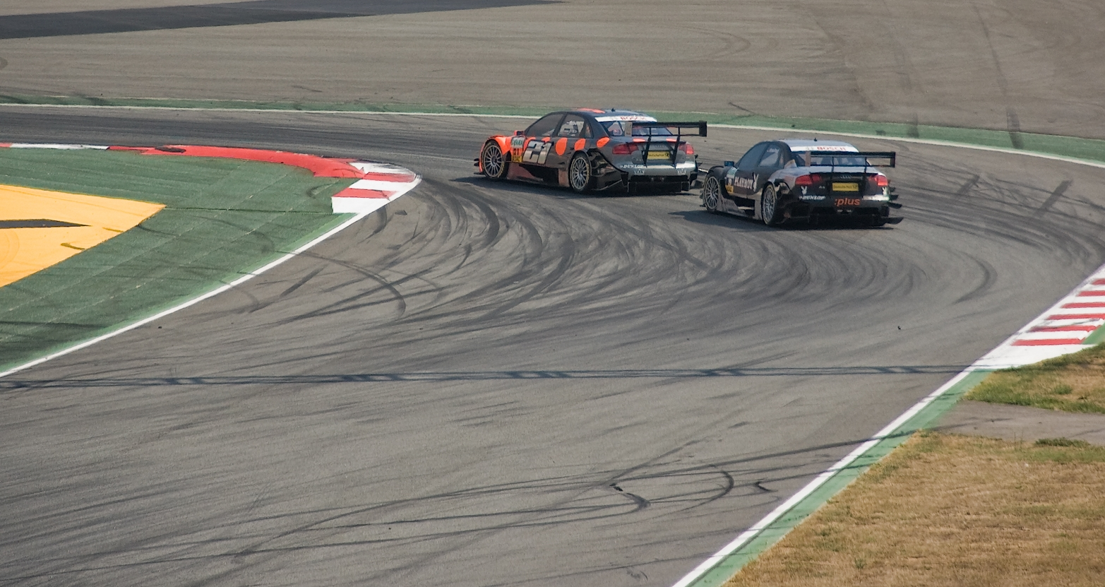 Albers & Winkelhock